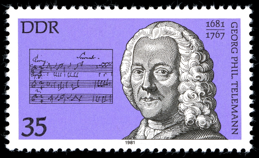 Ausgabepreis: 35 Pfennig First Day of Issue / Erstausgabetag: 5. Mai 1981 Auflage: 3.500.000 Entwurf: Gerhard Stauf Druckverfahren: Offsetdruck Michel-Katalog-Nr: Ländercode-MiNr: 2606